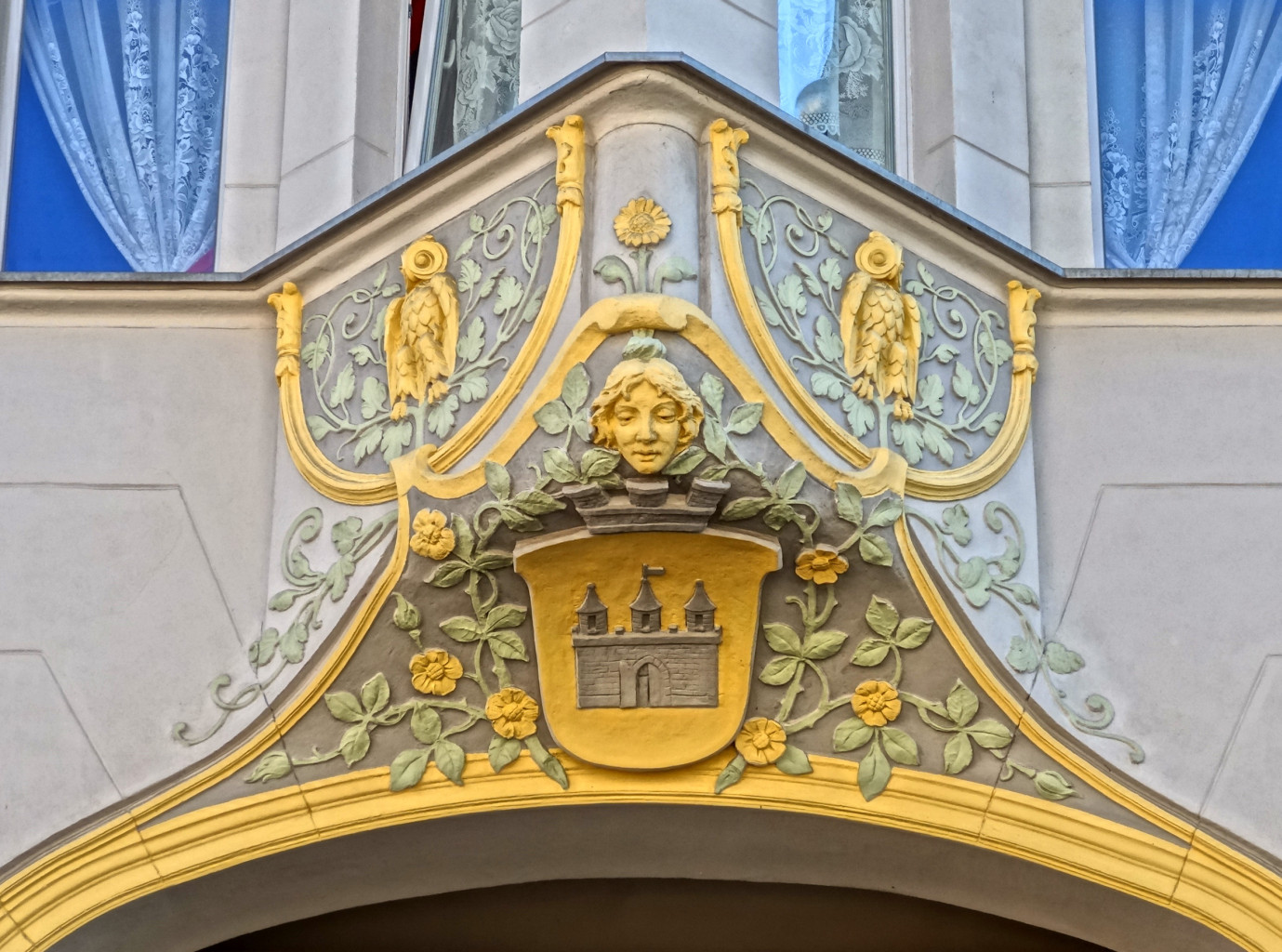 Kamienica przy ul. Cieszkowskiego 11 w Bydgoszczy (1898-1899 Józef Święcicki)